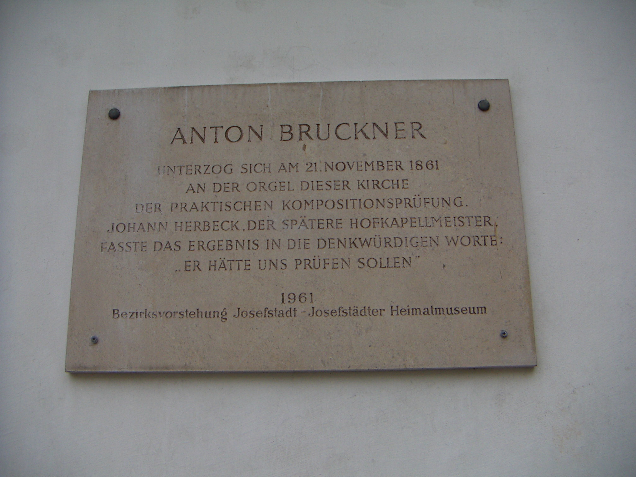 Anton Bruckner unterzog sich am 21. November 1861 an der Orgel der Piaristenkirche in Wien der praktischen Kompositionsprüfung. Johann von Herbeck: Er hätte uns prüfen sollen.